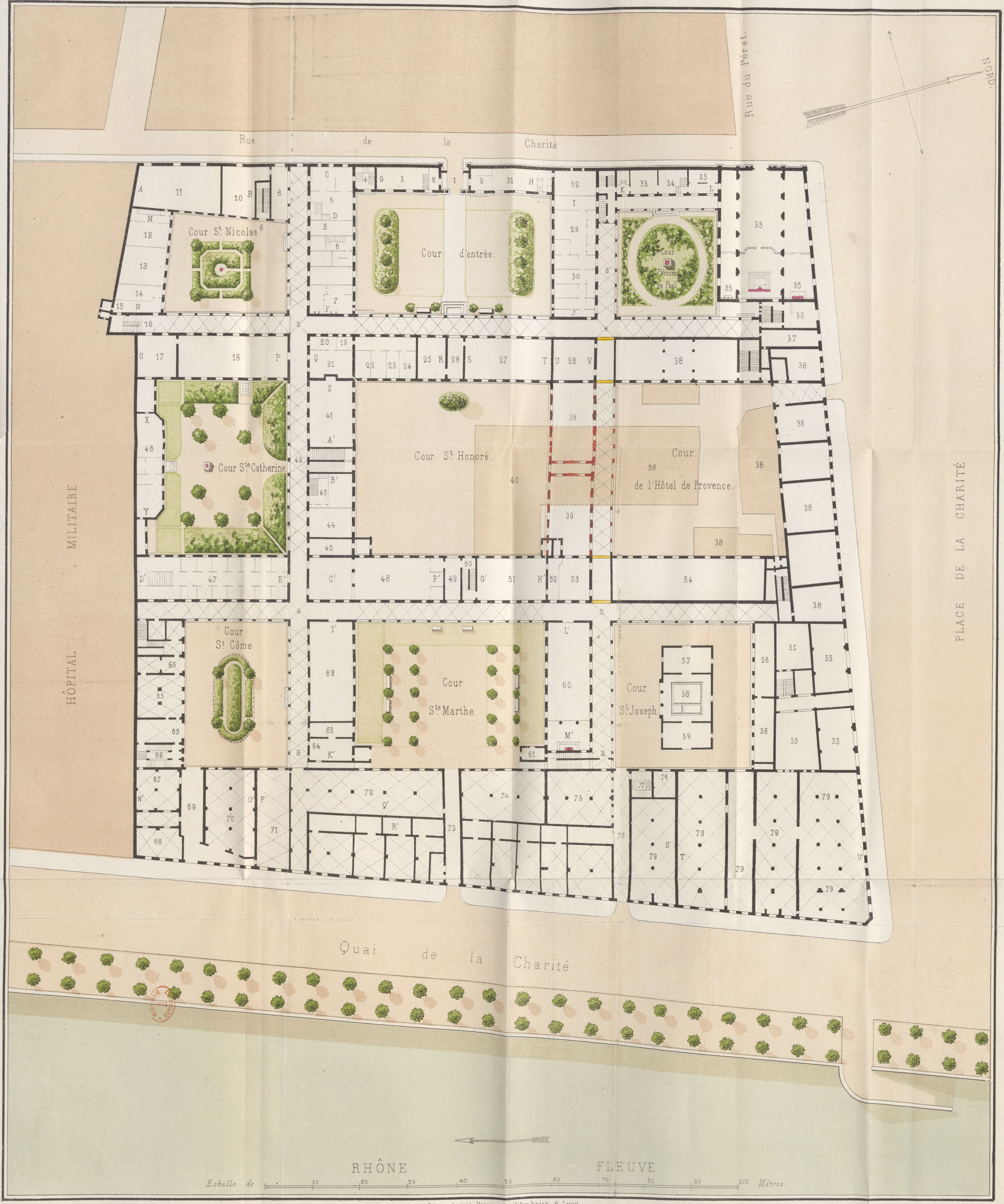 Considérations sur la salubrité de l'Hôtel-Dieu et de l'hospice de la Charité de Lyon.